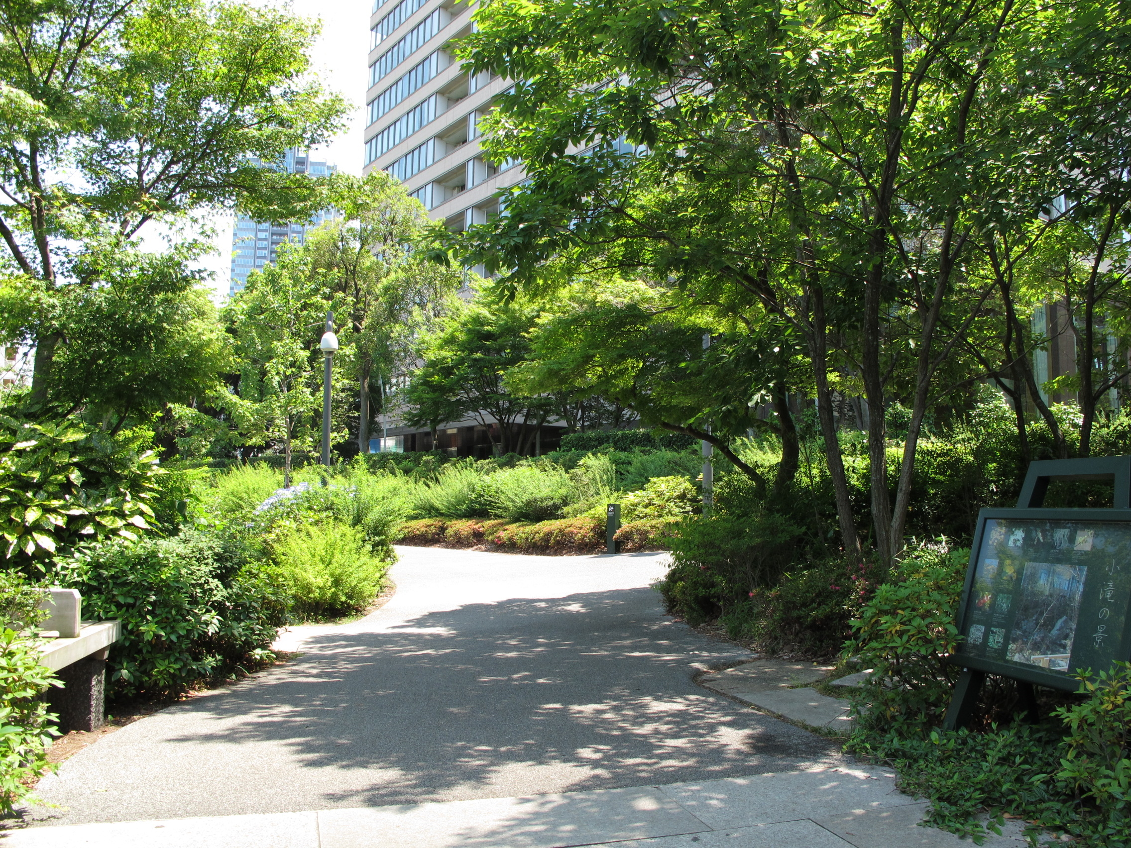 Hinokicho Park